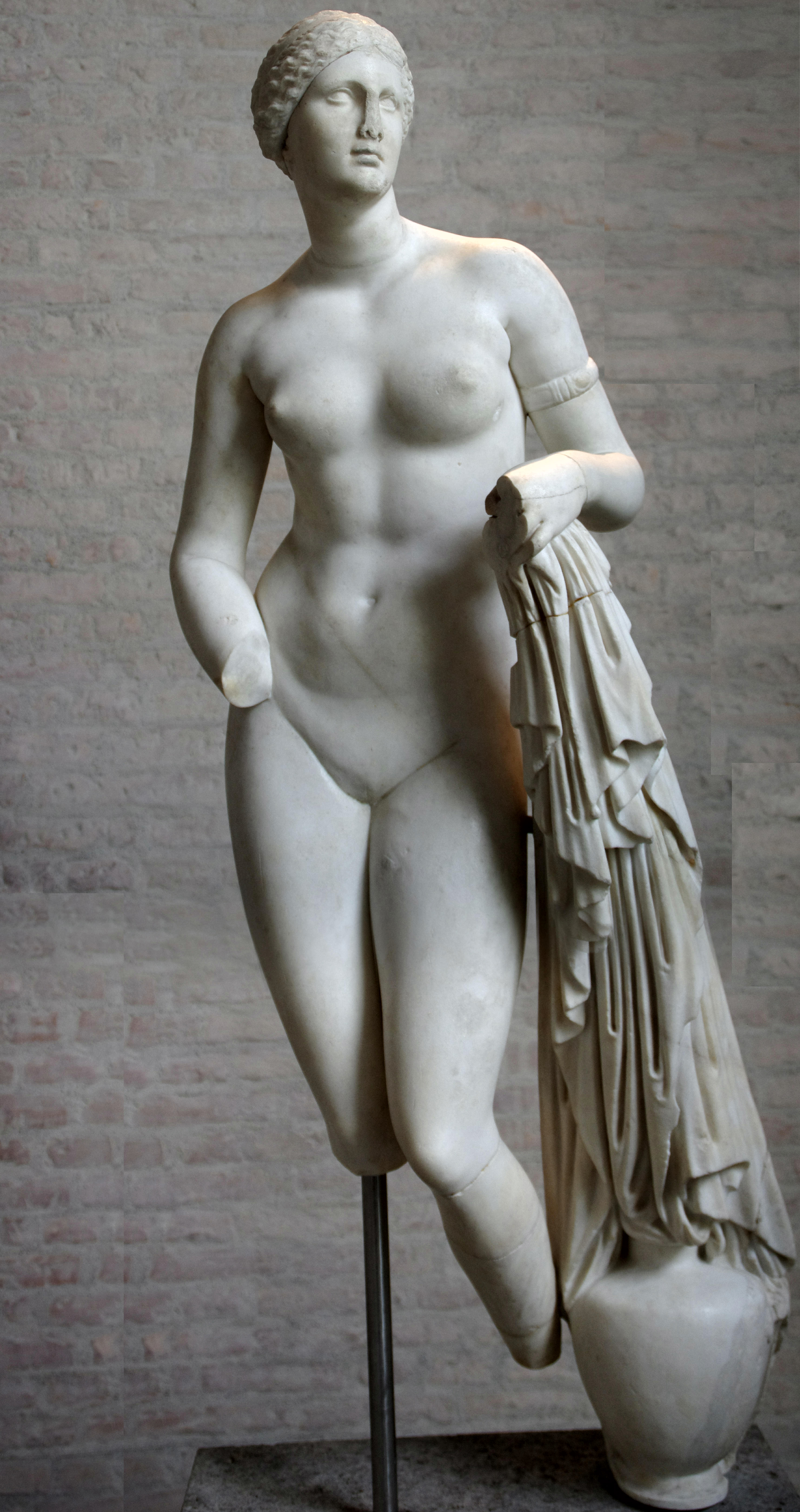 Aphrodite von Knidoslu Afrodita (Roma dövrünə aid), Münhen, Antik muzey, Glyptothek